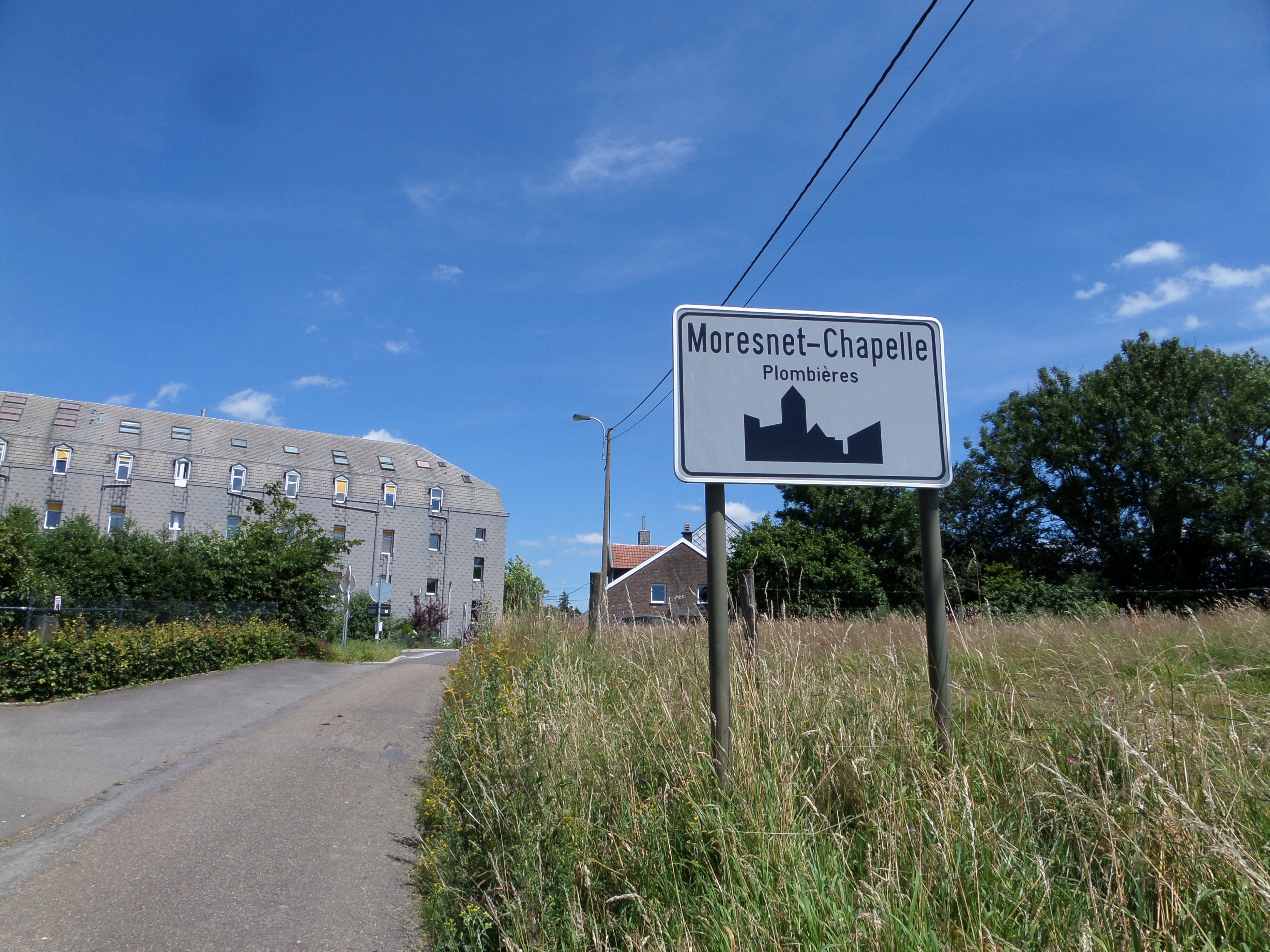 Panneau d'entrée de Moresnet-Chapelle (commune de Plombières) dans dans la province Belge de Liège